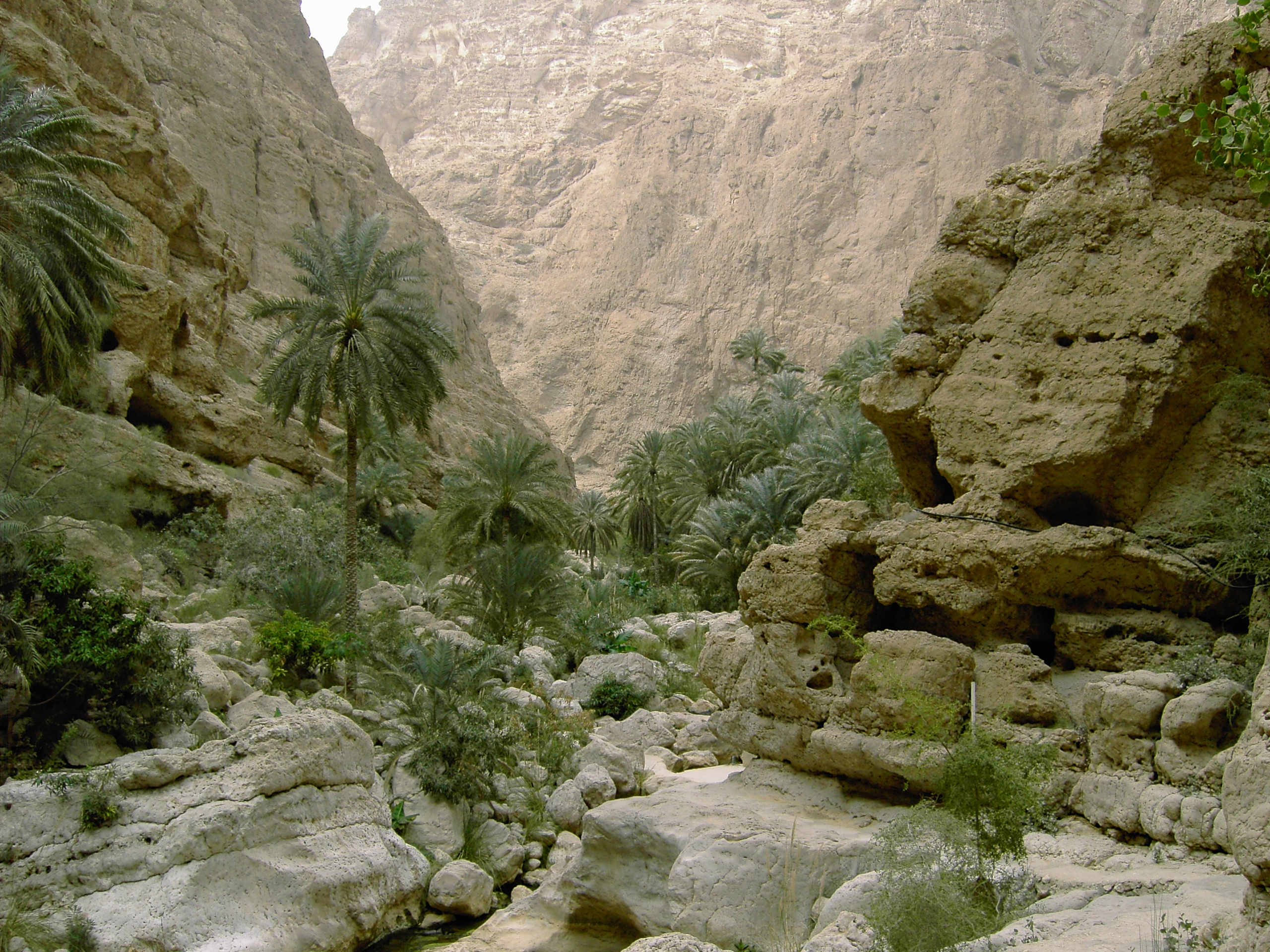 Das Wadi Shaab im östlichen Hadschar schneidet sich von der Küste weit ins Gebirge hinein.